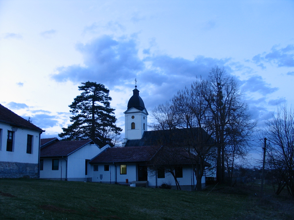 Crkva i stacionar